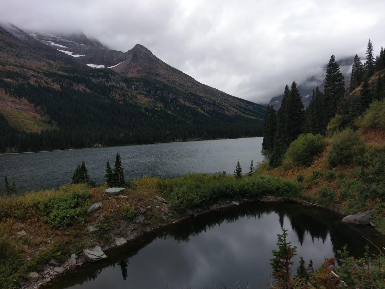 אגם ג'וזפין באזןר מני גליישר בפארק הלאומי גליישר, ספטמבר 2017